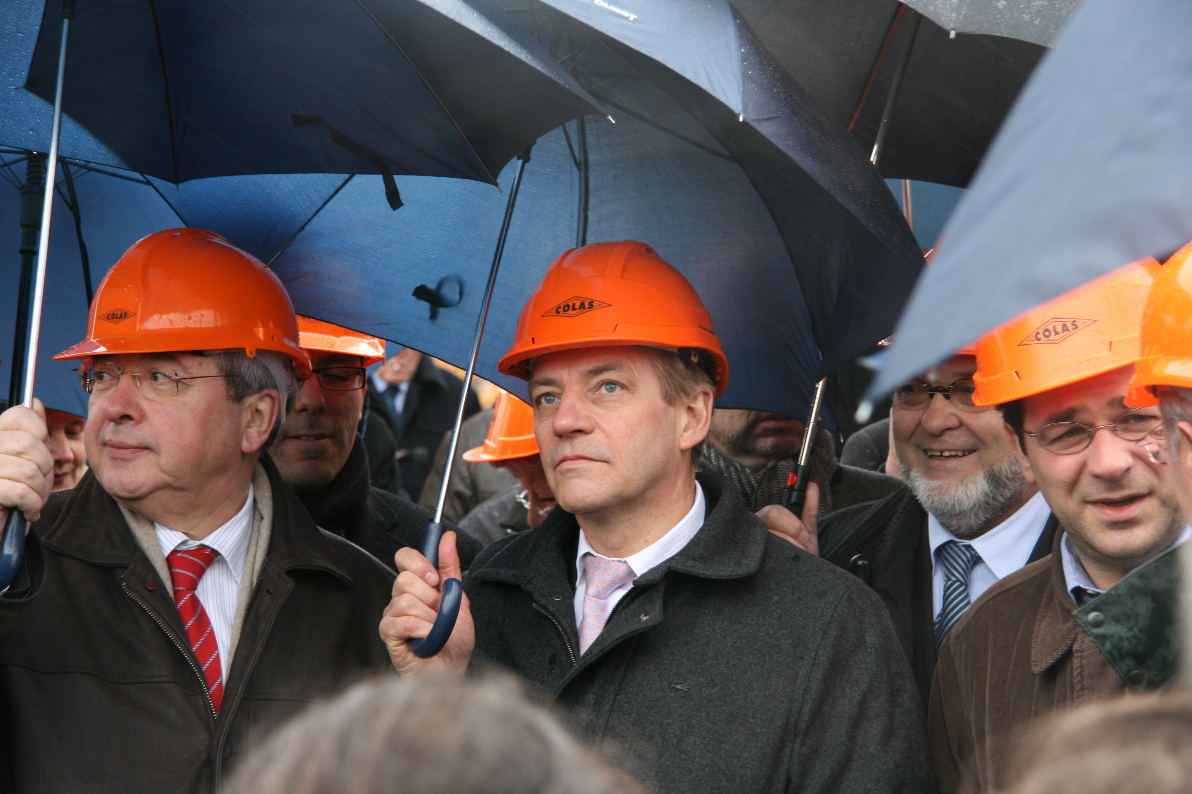 Dominique Lefebvre sur le chantier de la Croix-Petit février 2010